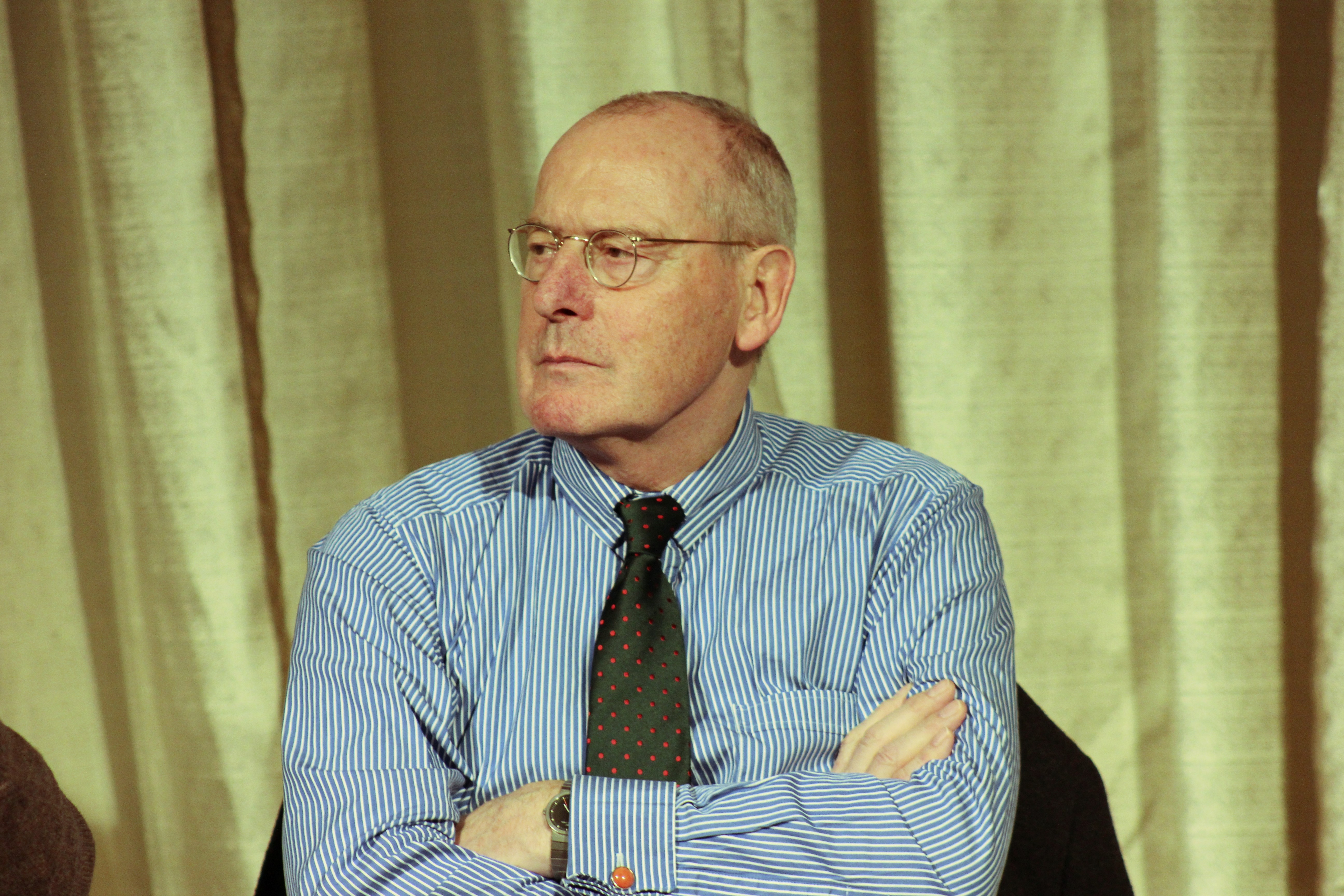 Der Philosoph Volker Gerhardt auf der Konferenz "Einbruch der Dunkelheit" am 25.01.2014 in der Berliner Volkbühne.